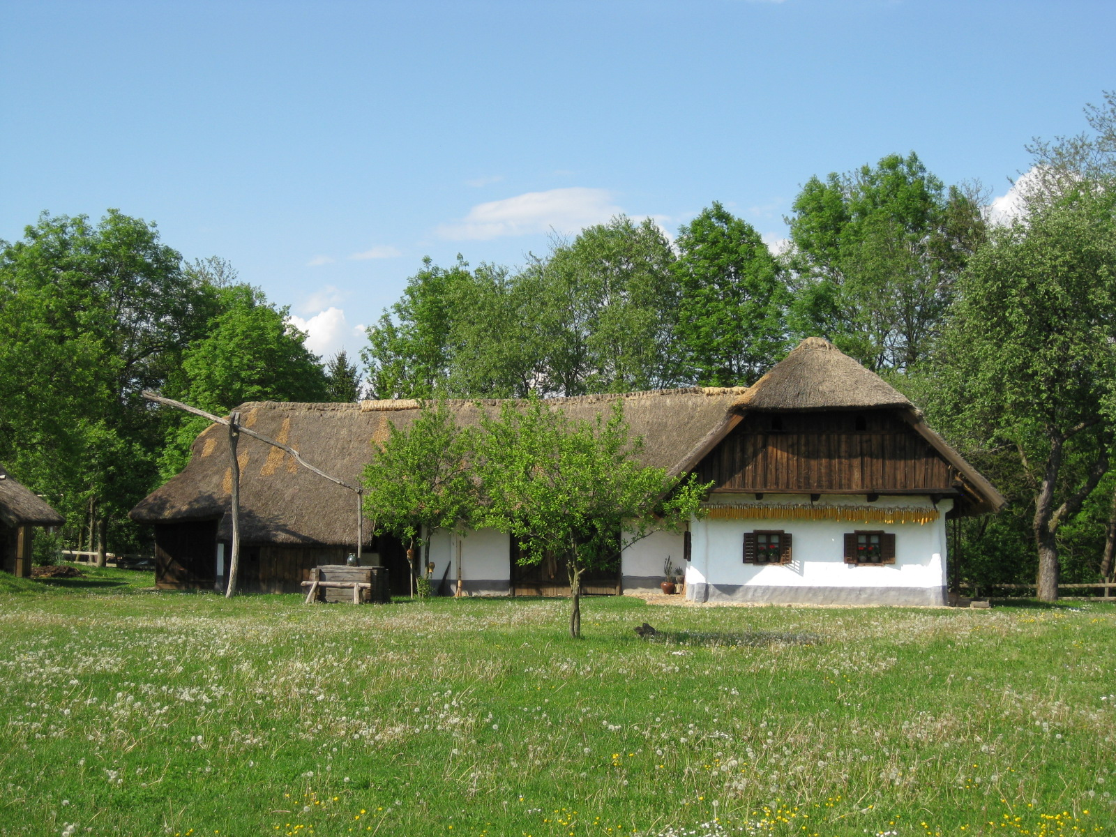 Dominkova domačija near Gorišnica, Slovenia. Slovenia's oldest panonian style built house (ca. 300 years)